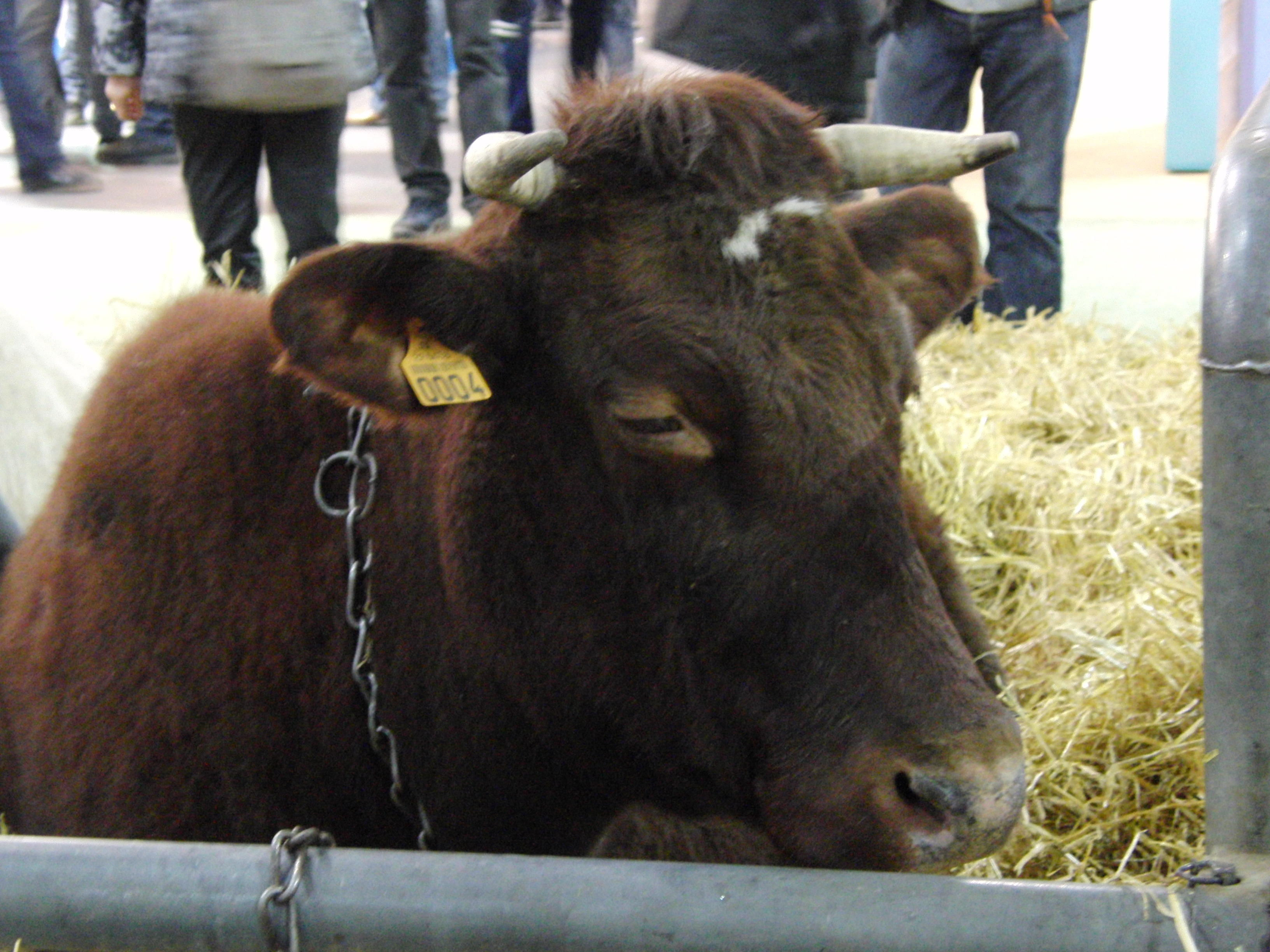 Vache Armoricaine - Salon international de l'agriculture 2013, Paris, France